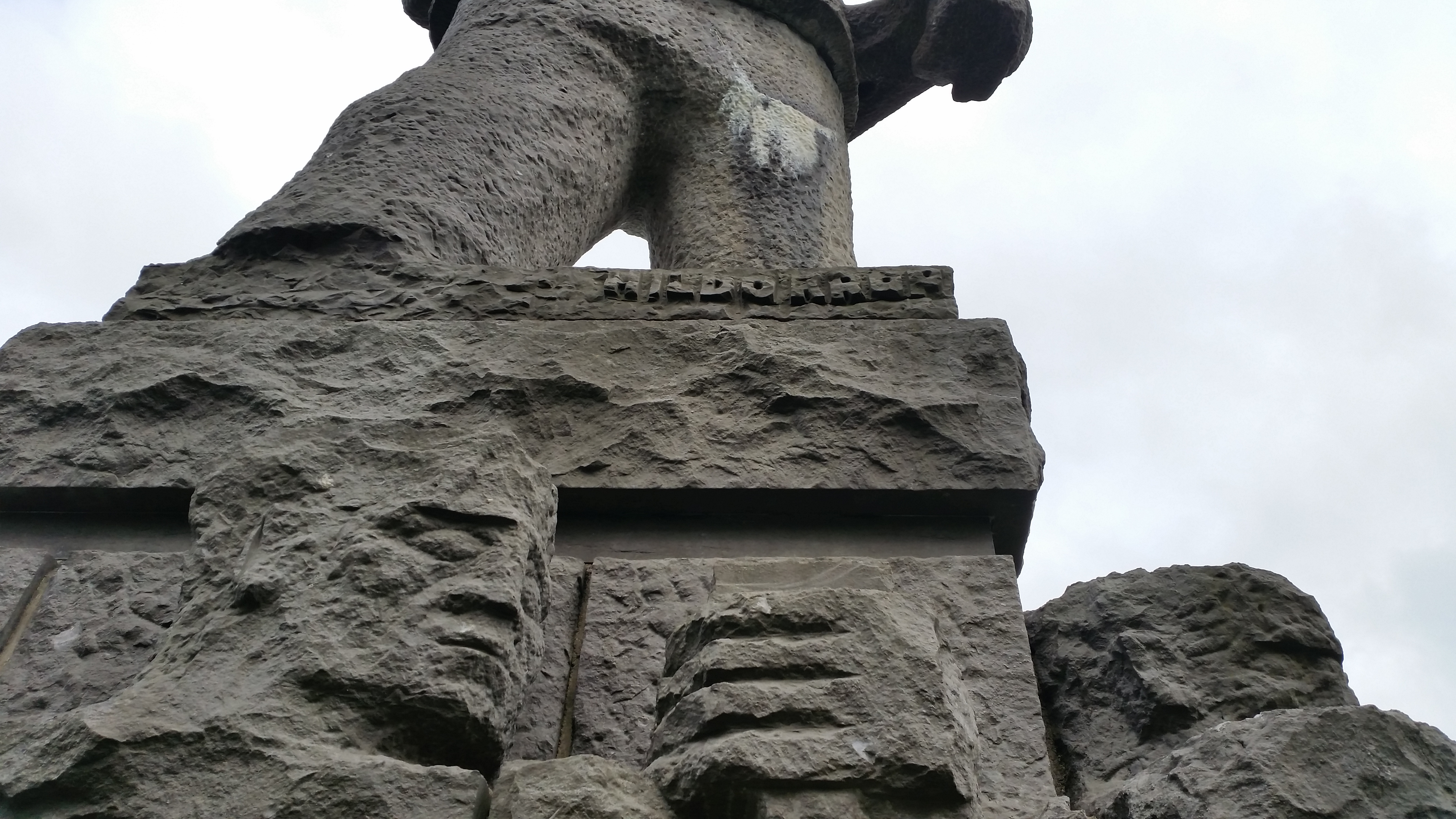 Standbeeld van H.P. Berlage, signatuur Hildo Krop (midden)